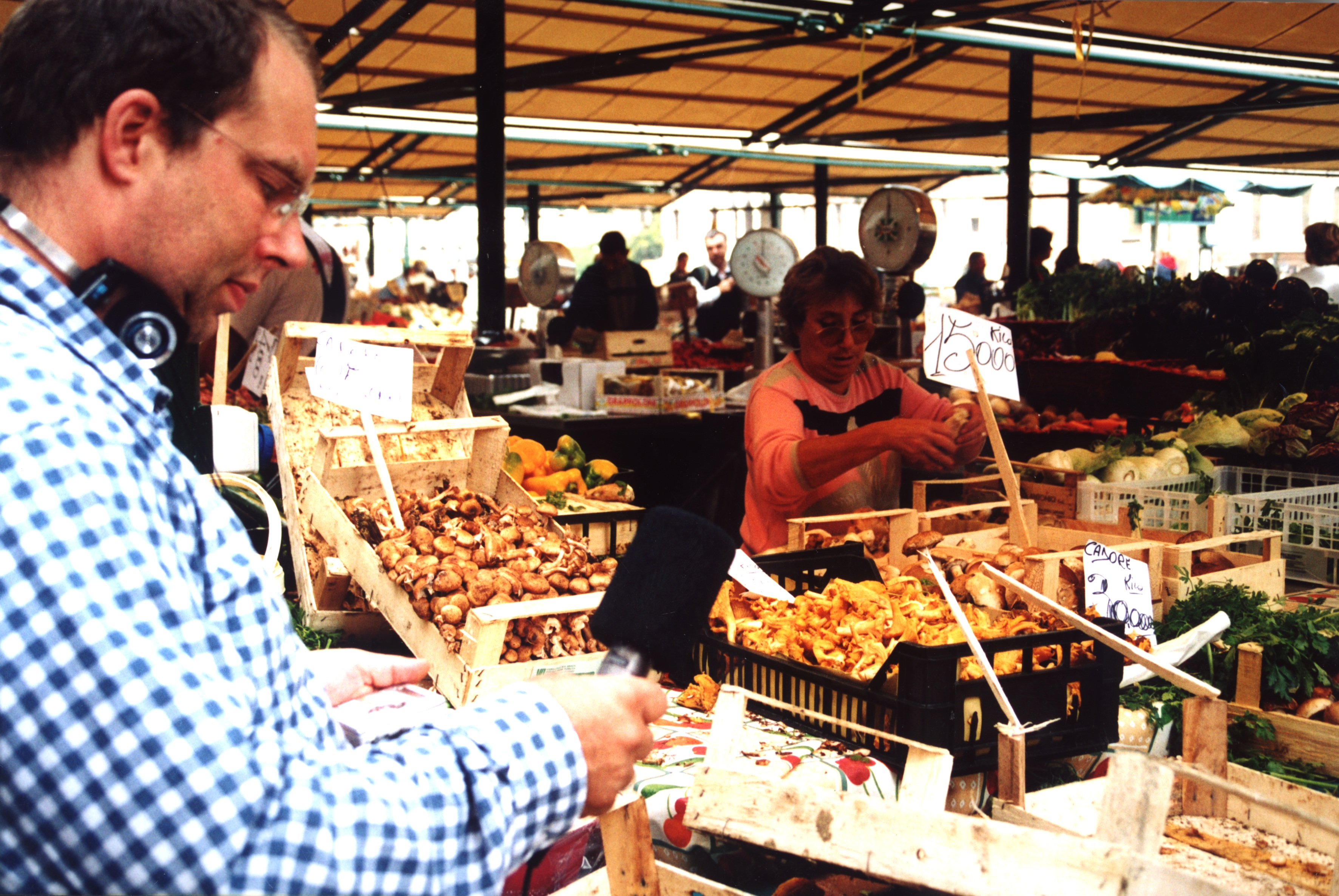 Geophon-Mitbegründer Matthias Morgenroth bei einer Aufnahme